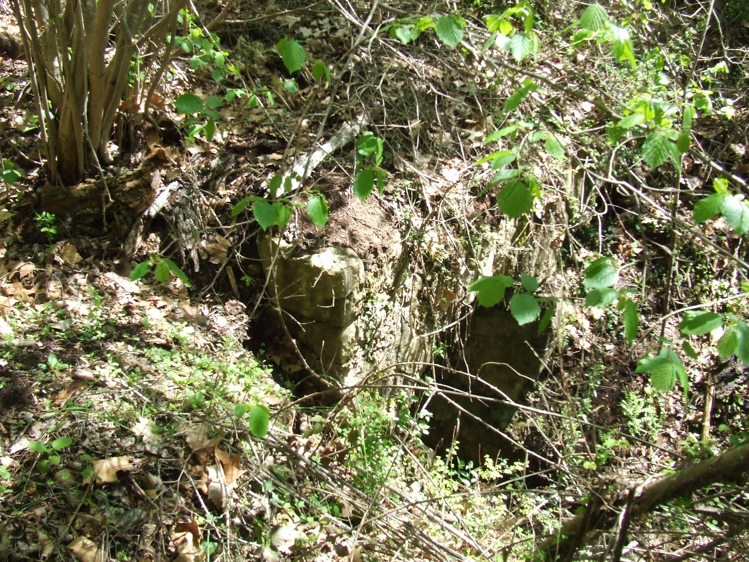 Carcabà del Molí dels Sorts (Marfà, Castellcir, Moianès)